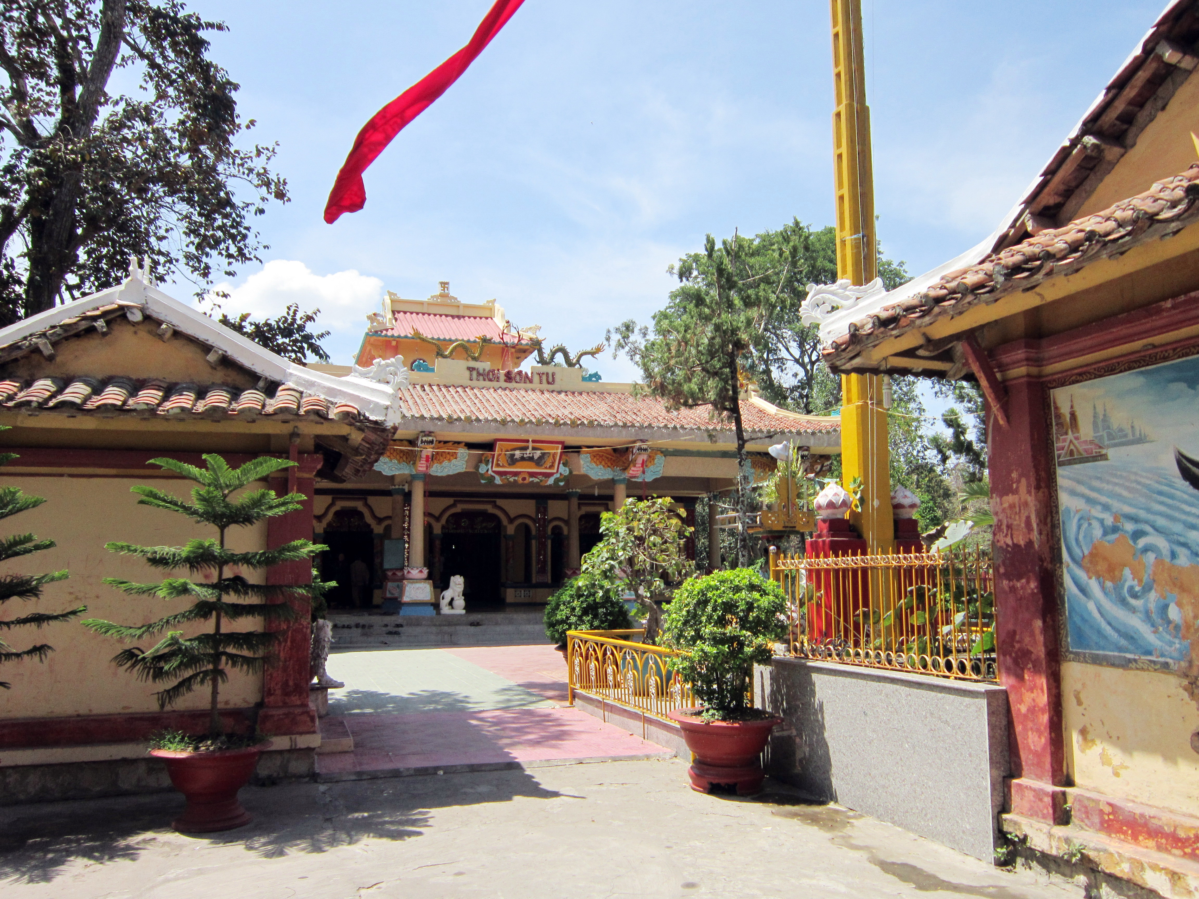 Chùa Thới Sơn tọa lạc tại xã Thới Sơn, huyện Tịnh Biên, tỉnh An Giang, Việt Nam. Đây là một ngôi chùa của đạo Bửu Sơn Kỳ Hương.